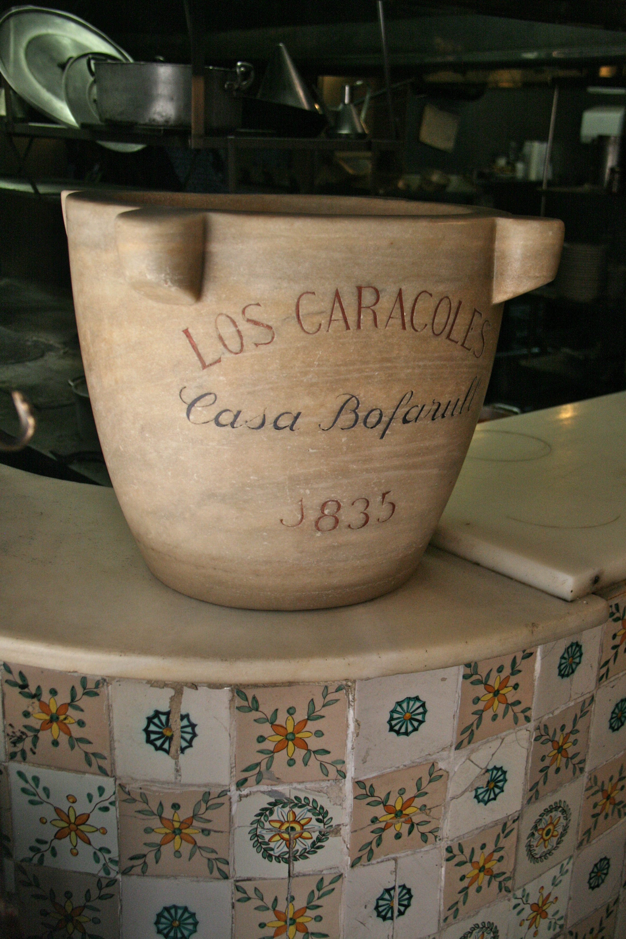 Restaurante "Los Caracoles" - Barcelona